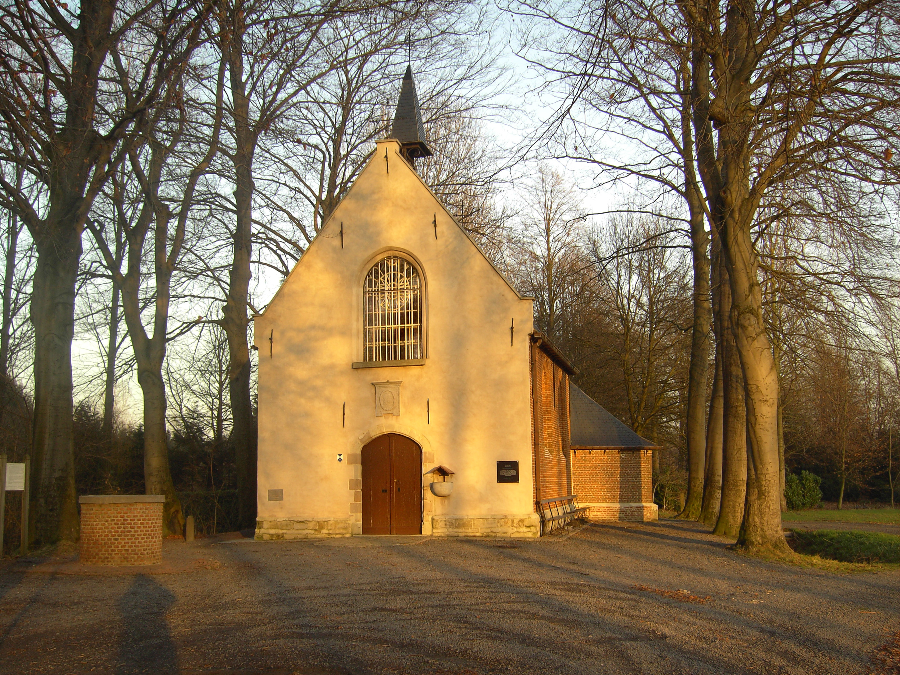 Eksaarde (Lokeren) in Belgium - H. Kruiskapel